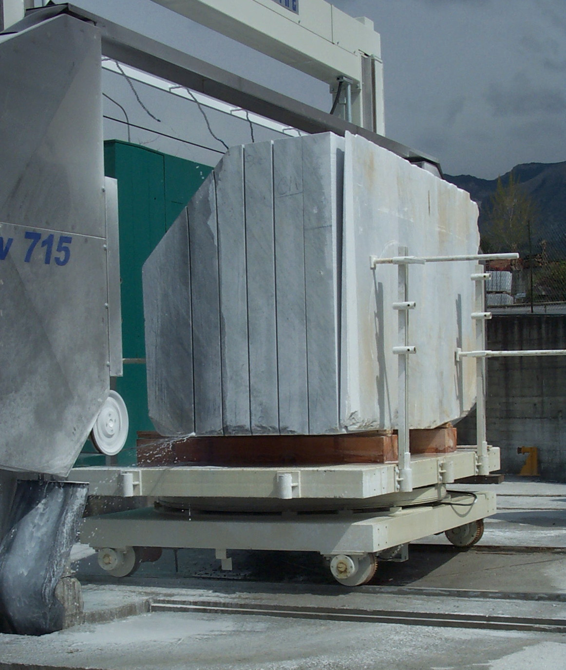 Seilsäge